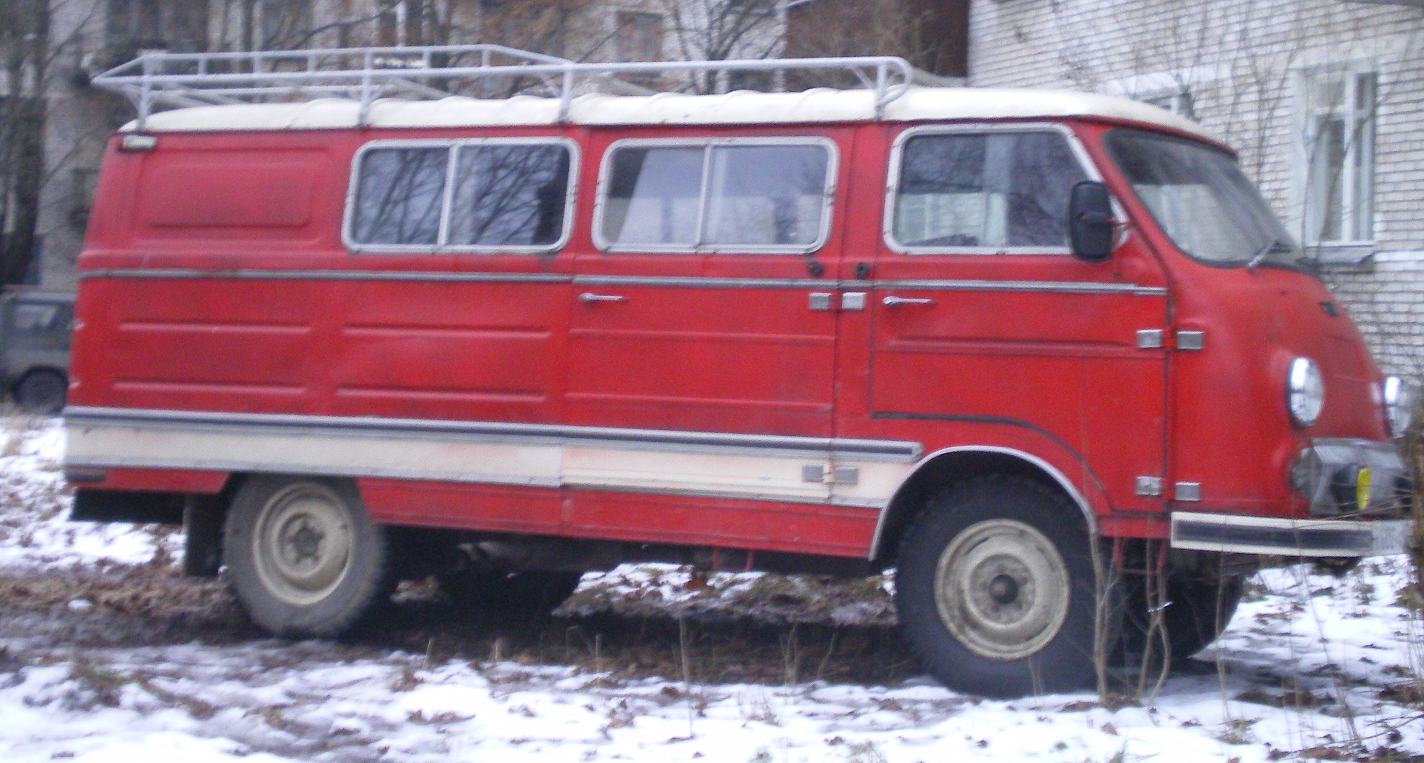 RAF-977 (ЕрАЗ-762 ?) сбоку